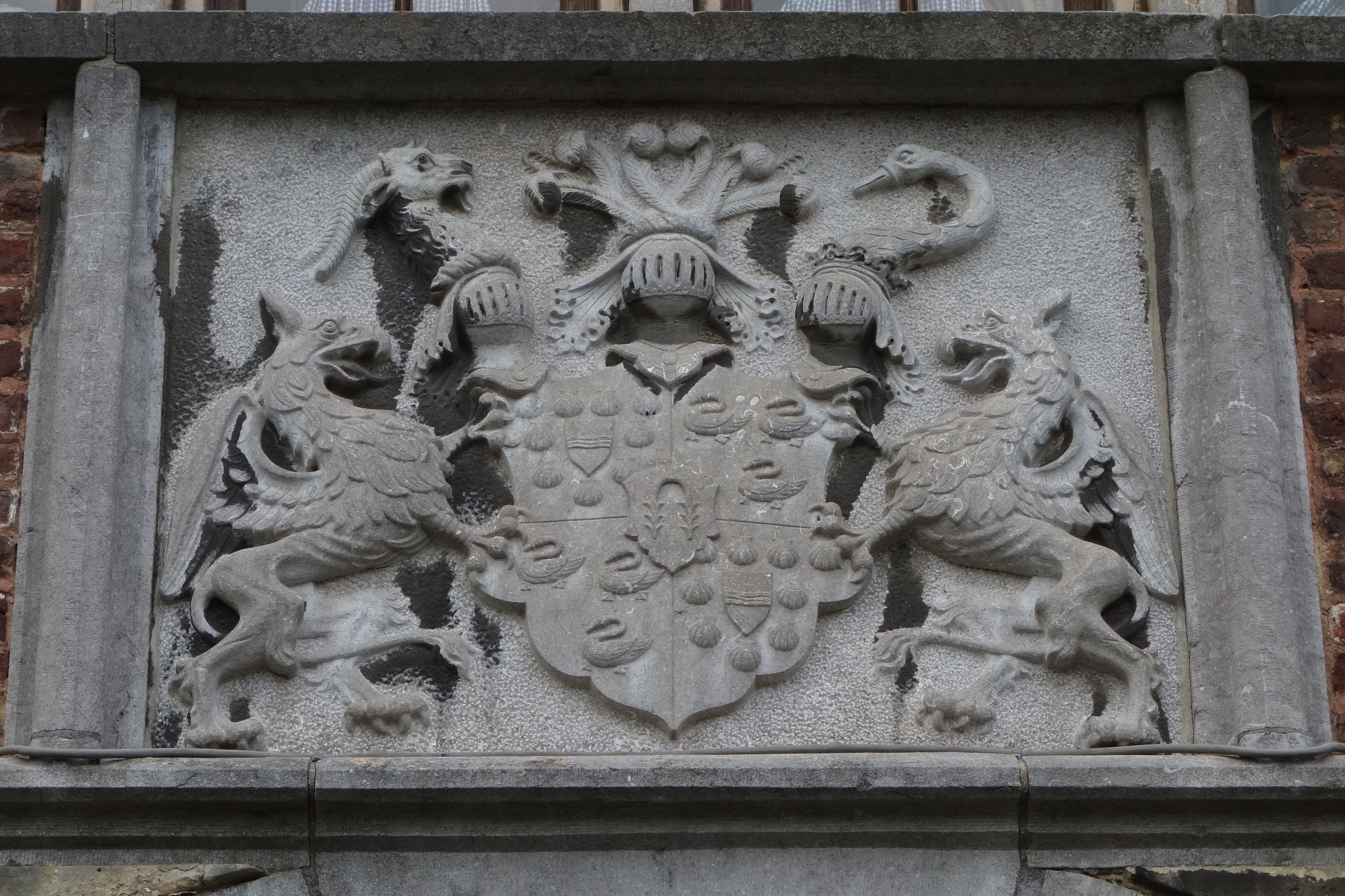 Familiewapen van De Loë-Imstenraedt-Van Mere boven de poort van het slot van Kasteel Mheer, in juni 2020.